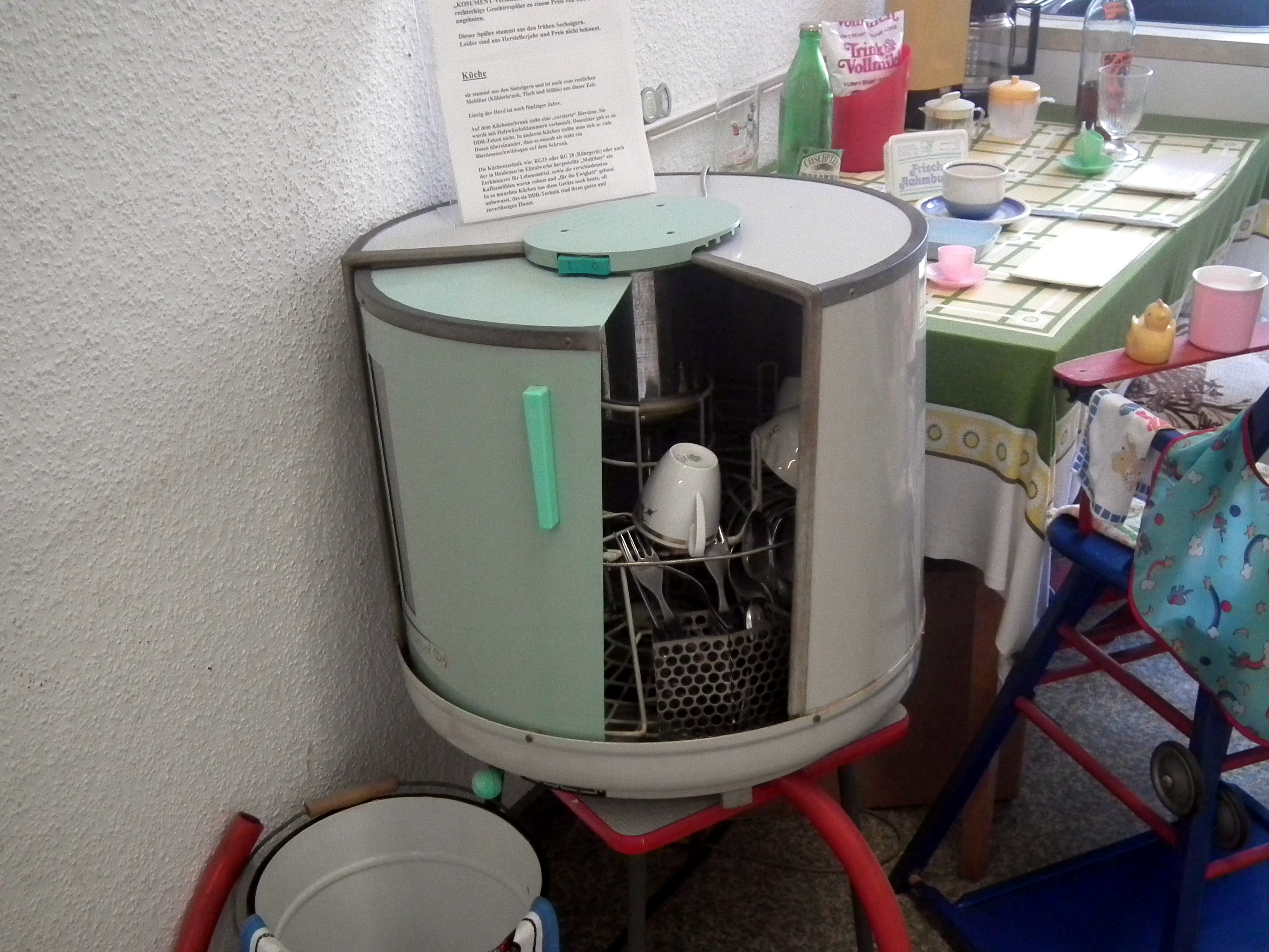 Geschirrspüler VEB Elektro Installation Oberlind, DDR-Museum Pirna, Veröffentlicht mit Genehmigung der Museumsleitung